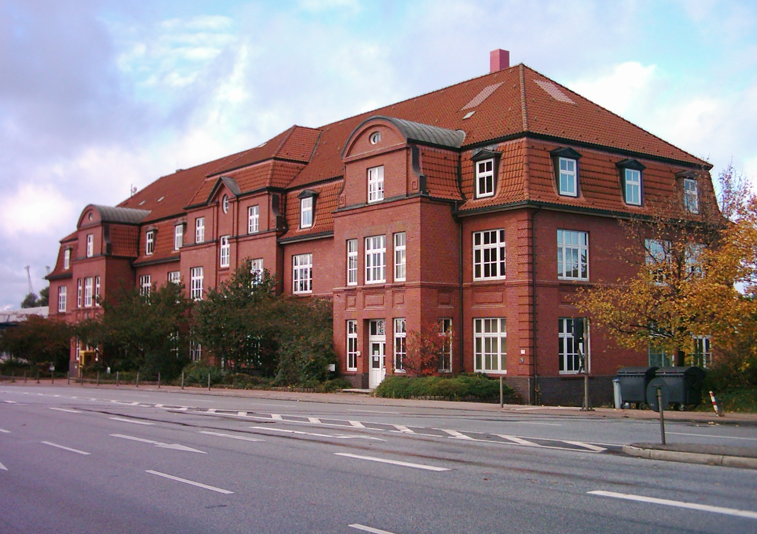 Hamburg Port Authority, Veddeler Damm. Ehemalige Behörde für Strom- und Hafenbau: Technische Landeseisenbahnaufsicht und Hafenbahn und Signal- und Fernmeldemeistrei.